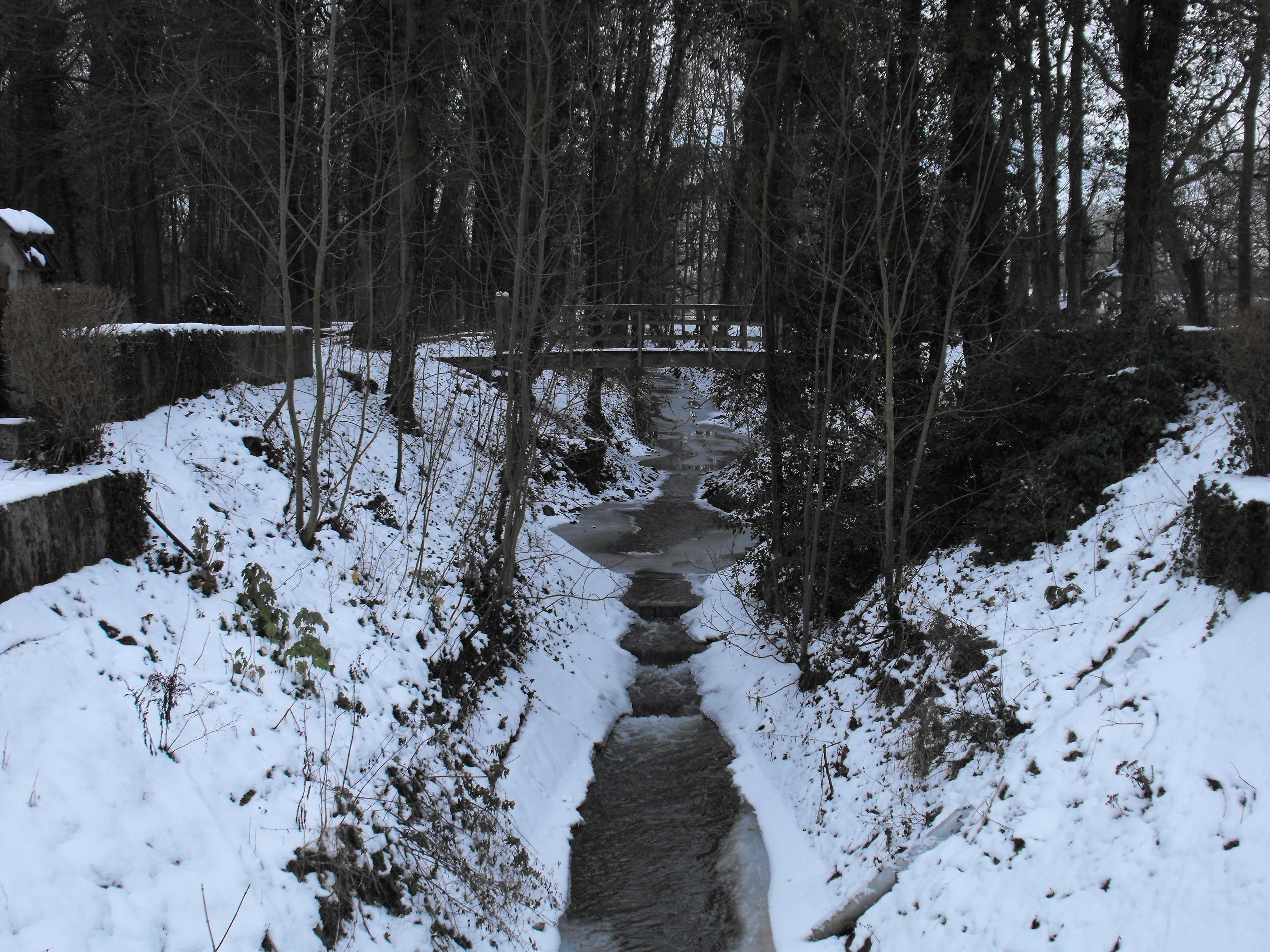 rivière Wampes